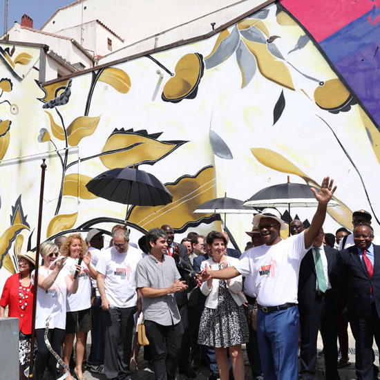 Hace cien años nacía Nelson Mandela en Mvezo, Sudáfrica. El que fuera el primer presidente negro sudafricano y Nobel de la Paz (1993) es homenajeado hoy por el Ayuntamiento de Madrid con la inauguración de un muro pintado por el artista Buntu Fchla (Ciudad del Cabo). En la medianera del edificio de la calle Mesón de Paredes, 35, que da a la plaza que lleva su nombre, se mostrará una obra inspirada en la Strelitzia reginae o Pájaro del Paraíso, flor preferida del hombre que sigue siendo un símbolo de la paz y la libertad.